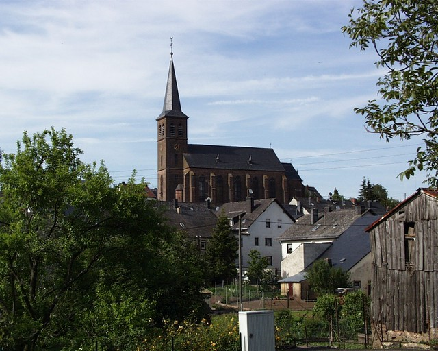 St. Rochus. Auf der Katz 2: Katholische Pfarrkirche St. Rochus.